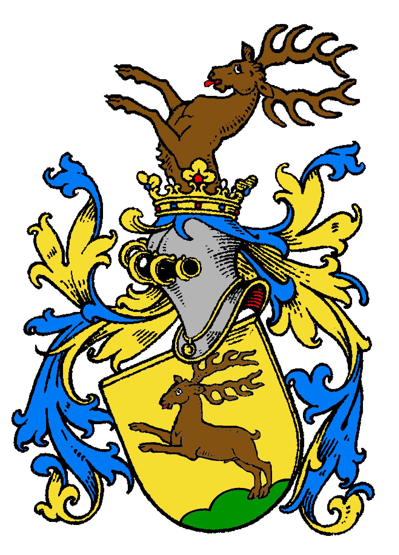 Wappen der von Hirsch auf Gereuth, eines fränkischen, 1818 königlich bayerisch geadelten Hoffaktorengeschlechts, dessen Stammreihe mit Moses Hirsch (um 1740–1810), Kaufmann in Königshofen (jetzt Gaukönigshofen) bei Ochsenfurt, beginnt.